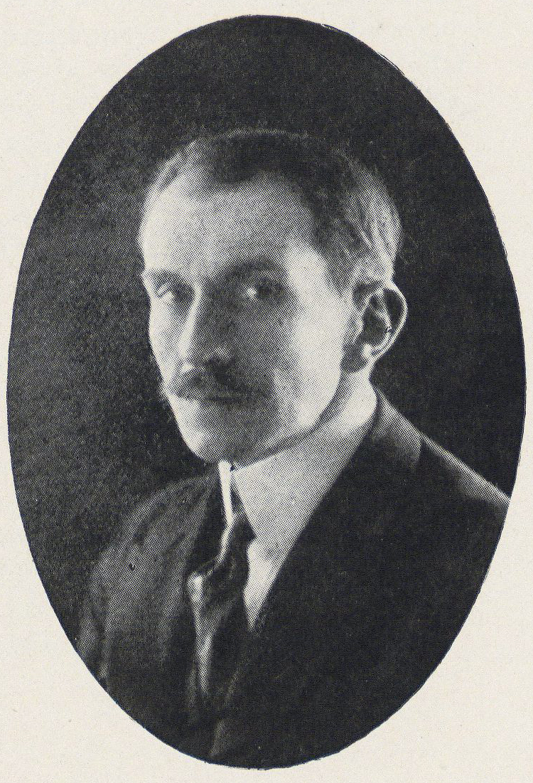 Enrique Molina Garmendia (La Serena, Chile, 4 de agosto de 1871 - Concepción, Chile, 8 de marzo de 1964) fue un filósofo y educador chileno. Promovió y fundó la Universidad de Concepción.